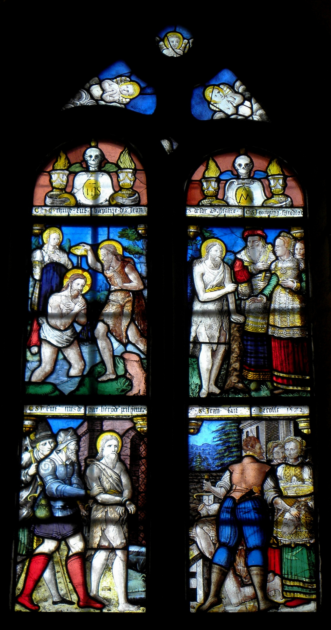 Vitrail de la vie de Saint-Jean-Baptiste de la chapelle Saint-Lubin de Plémet (22).